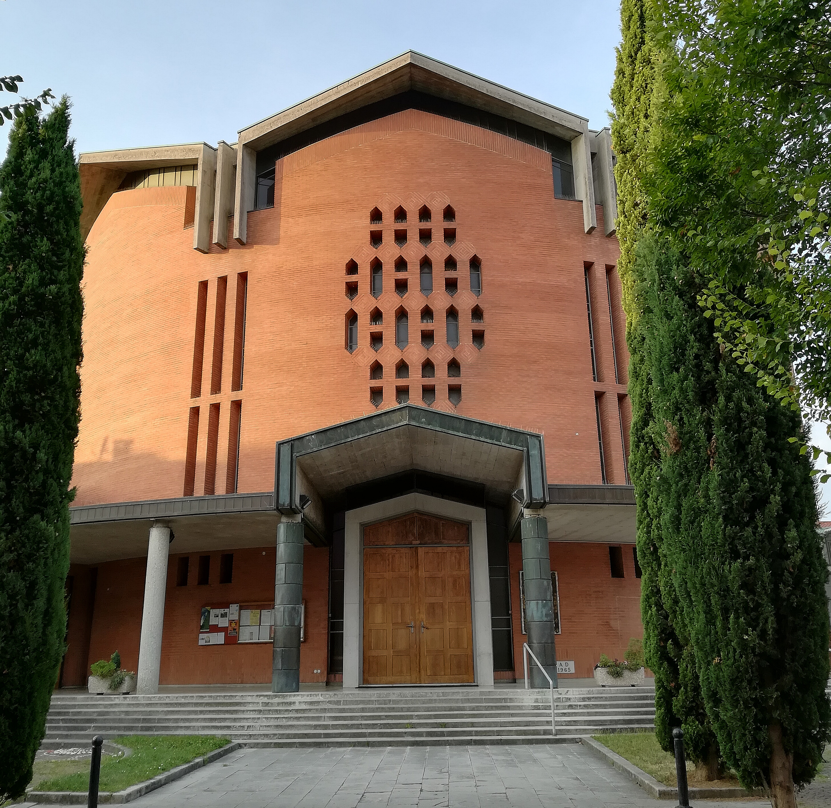 Il Duomo di Cervignano del Friuli (UD)